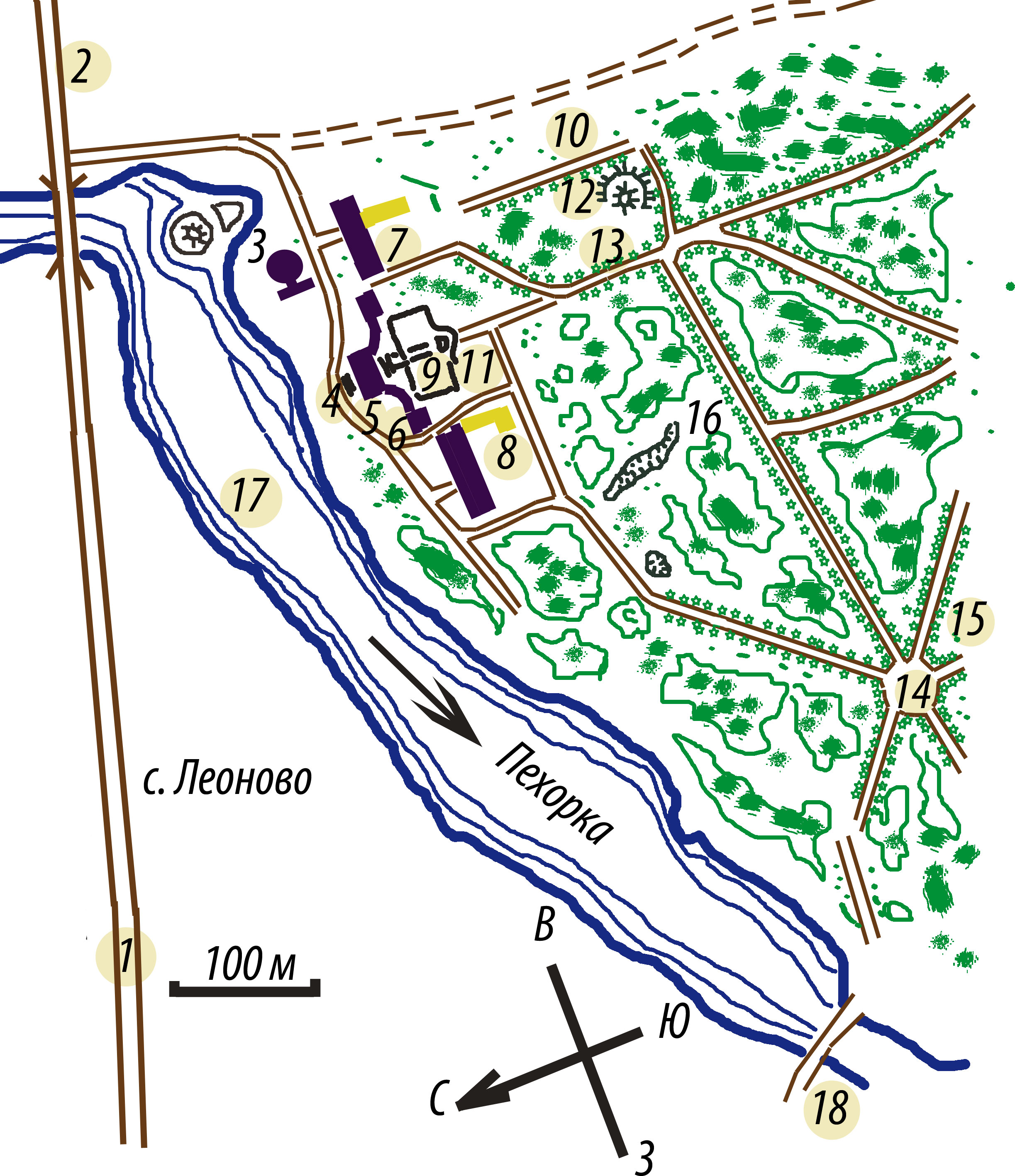 План-схема усадьбы Пехра-Яковлевское в 18 веке. Рисунок